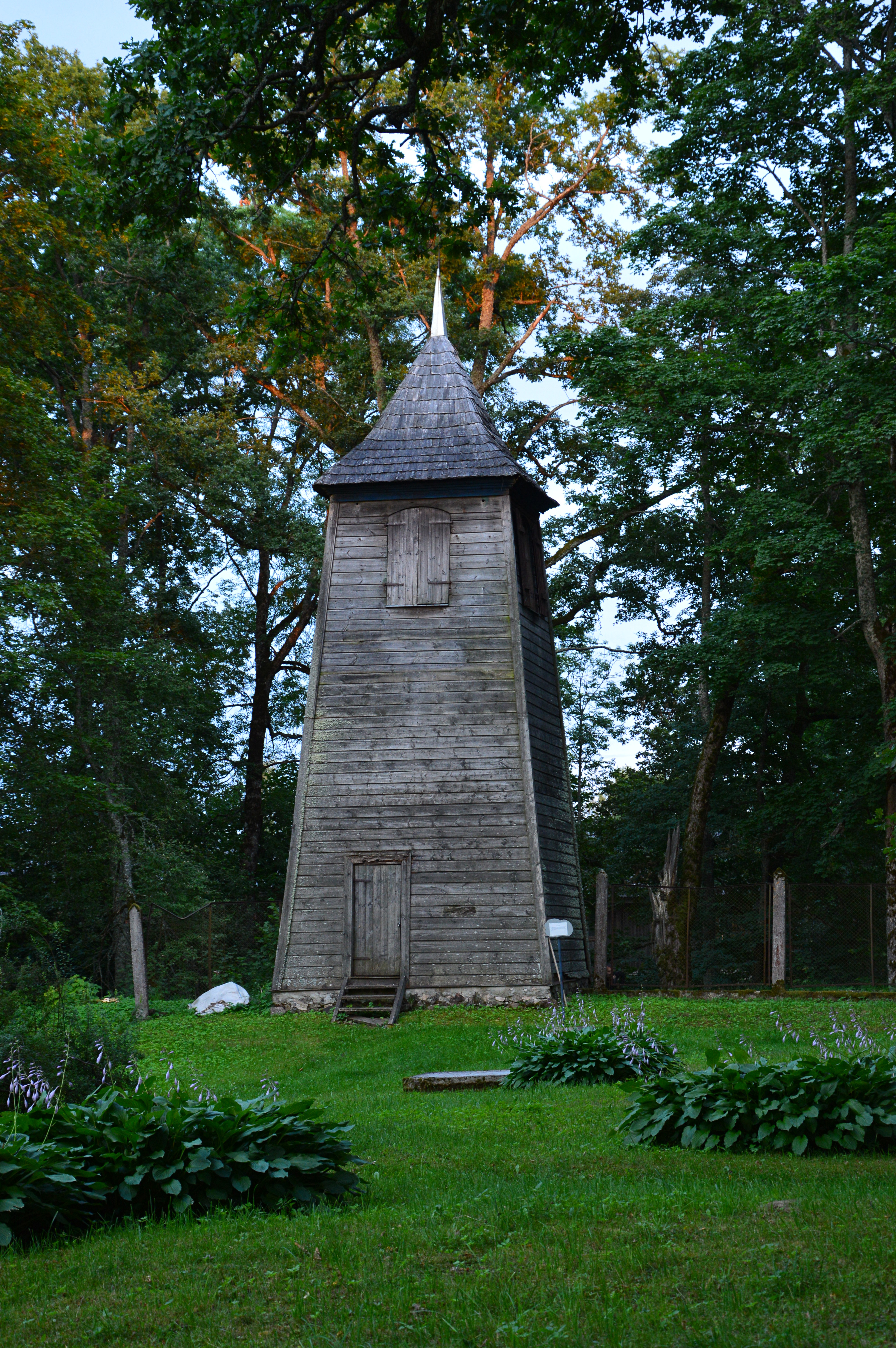 Zvanu tornis, Straupe